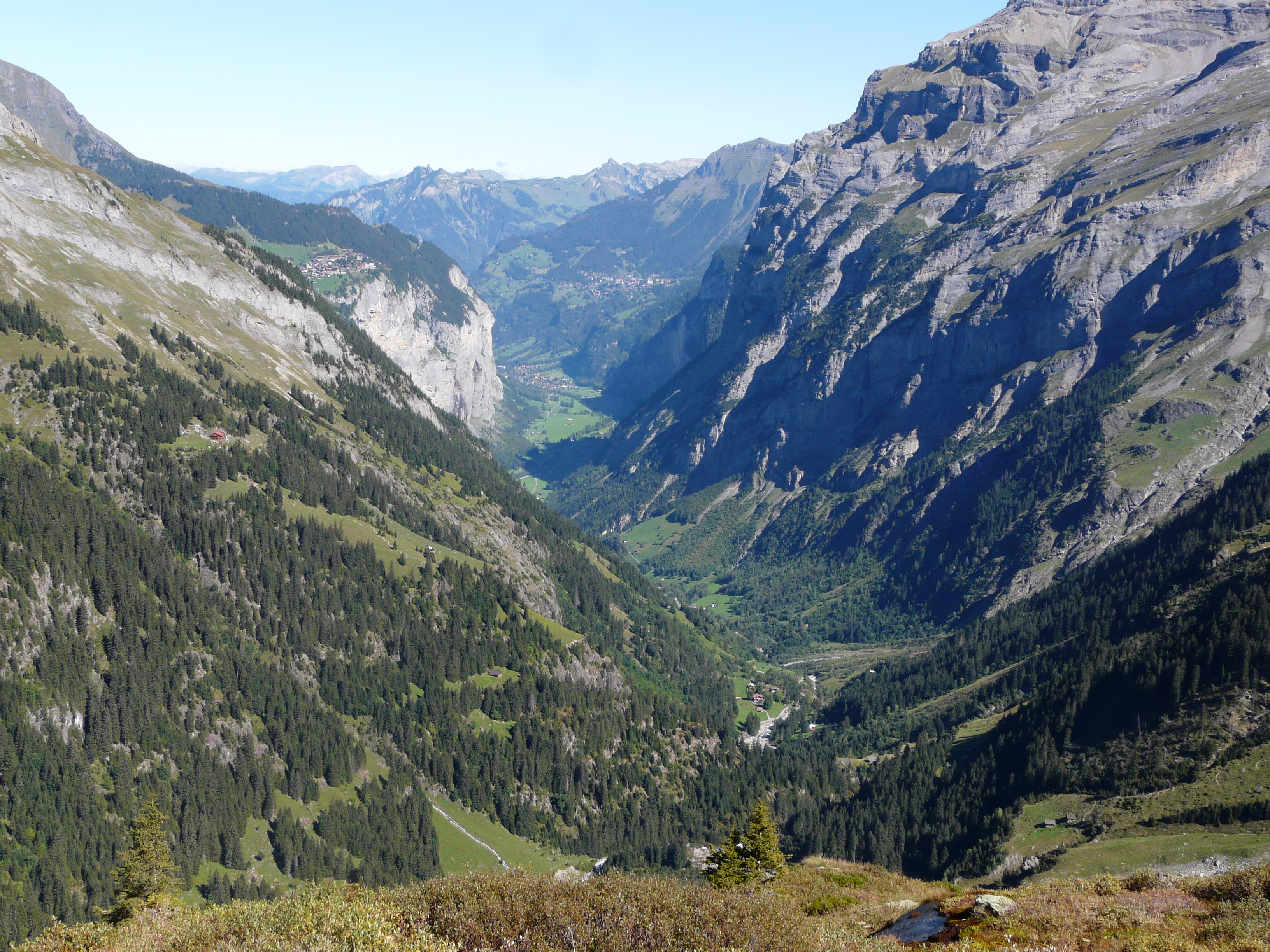 Blick von Mürren (links oben), das Lauterbrunnental mit Lauterbrunnen und Wengen (oberhalb von Lauterbrunnen). Vorne rechts die Alphütten Schwand. Aufgenommen vom Aufstiegsweg zur Schmadrihütte etwas oberhalb des Schmadribachfalls.